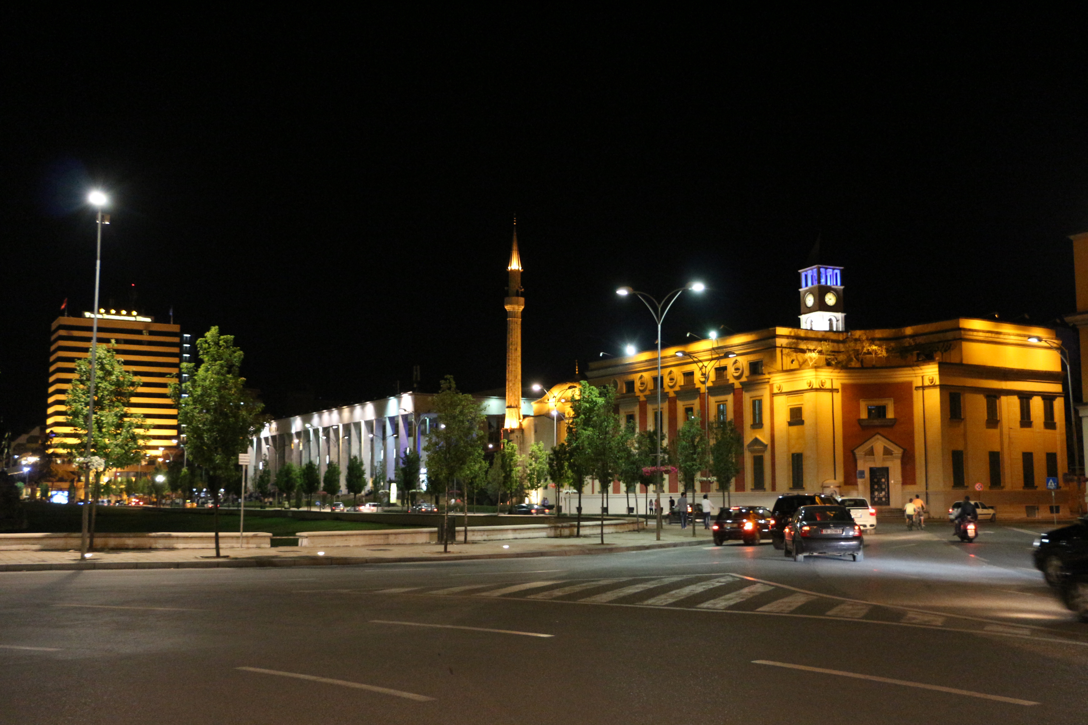 Aksi Kryesor Dhe Qendra Historike e Tiranës